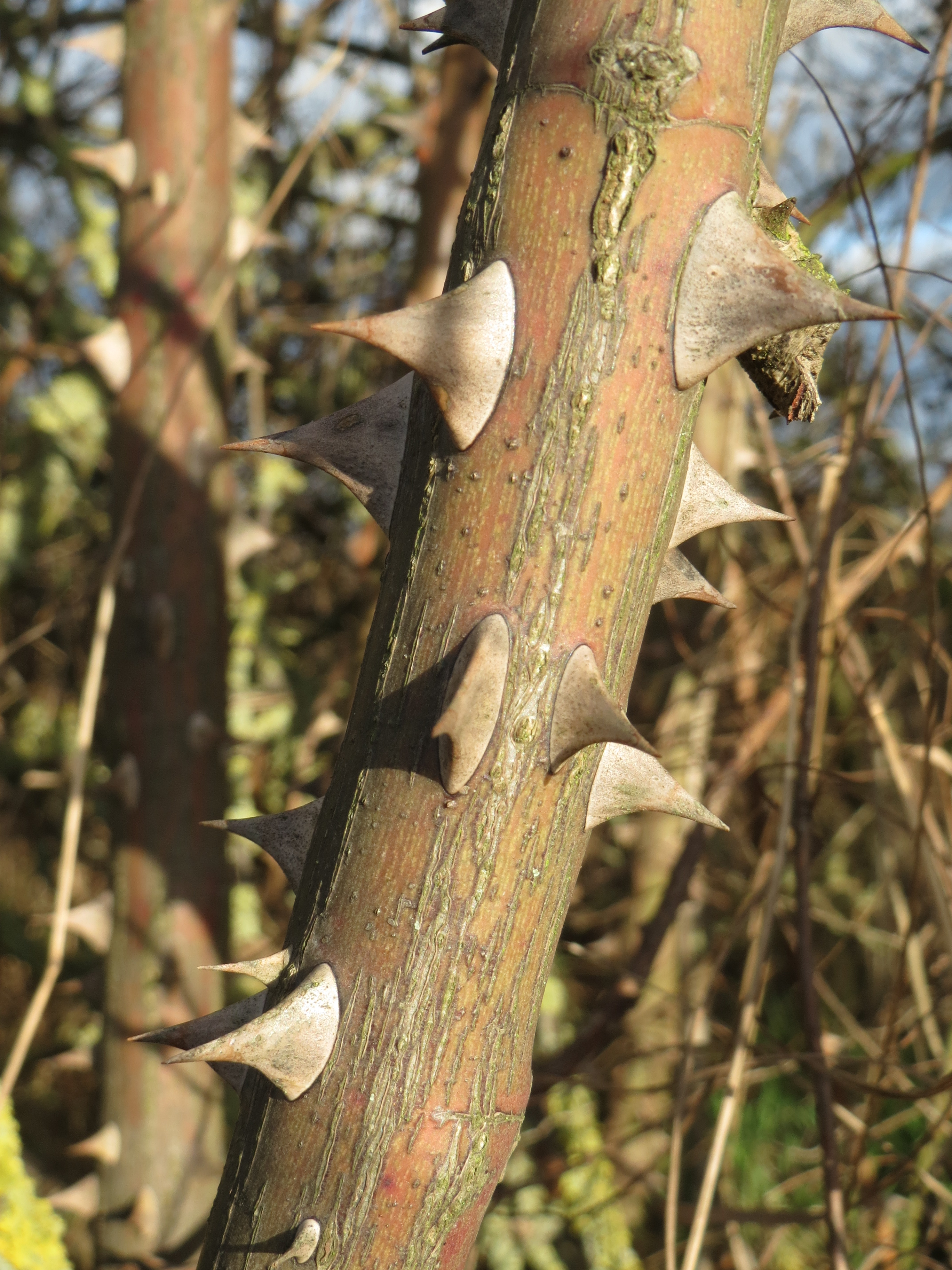 Dornen der Hunds-Rose (Rosa canina) bei Reilingen